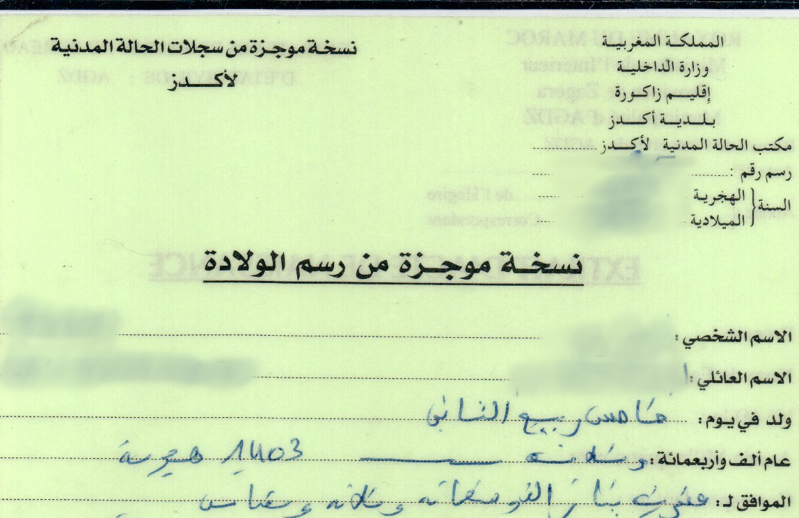 Acte de naissance Marocain